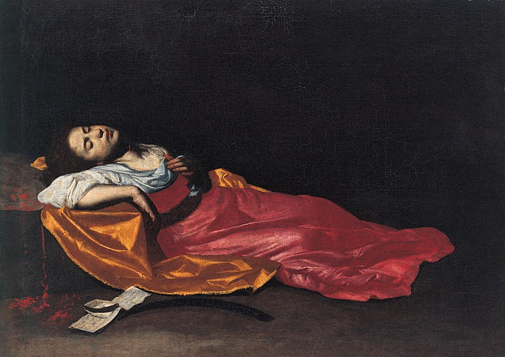 Santa Cecilia mártirtitle QS:P1476,es:"Santa Cecilia mártir" label QS:Les,"Santa Cecilia mártir"